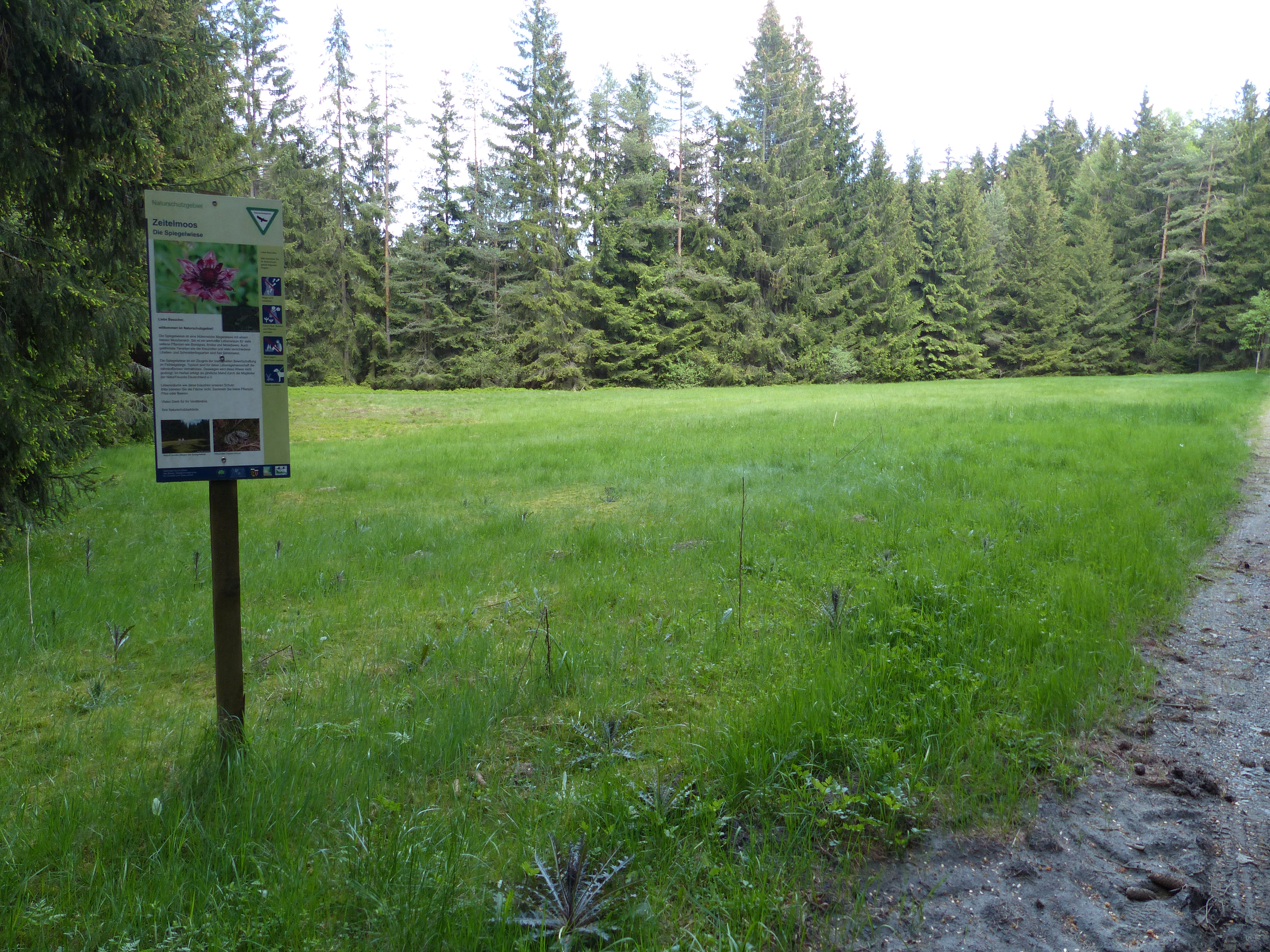 Zeitelmoos und Umgebung